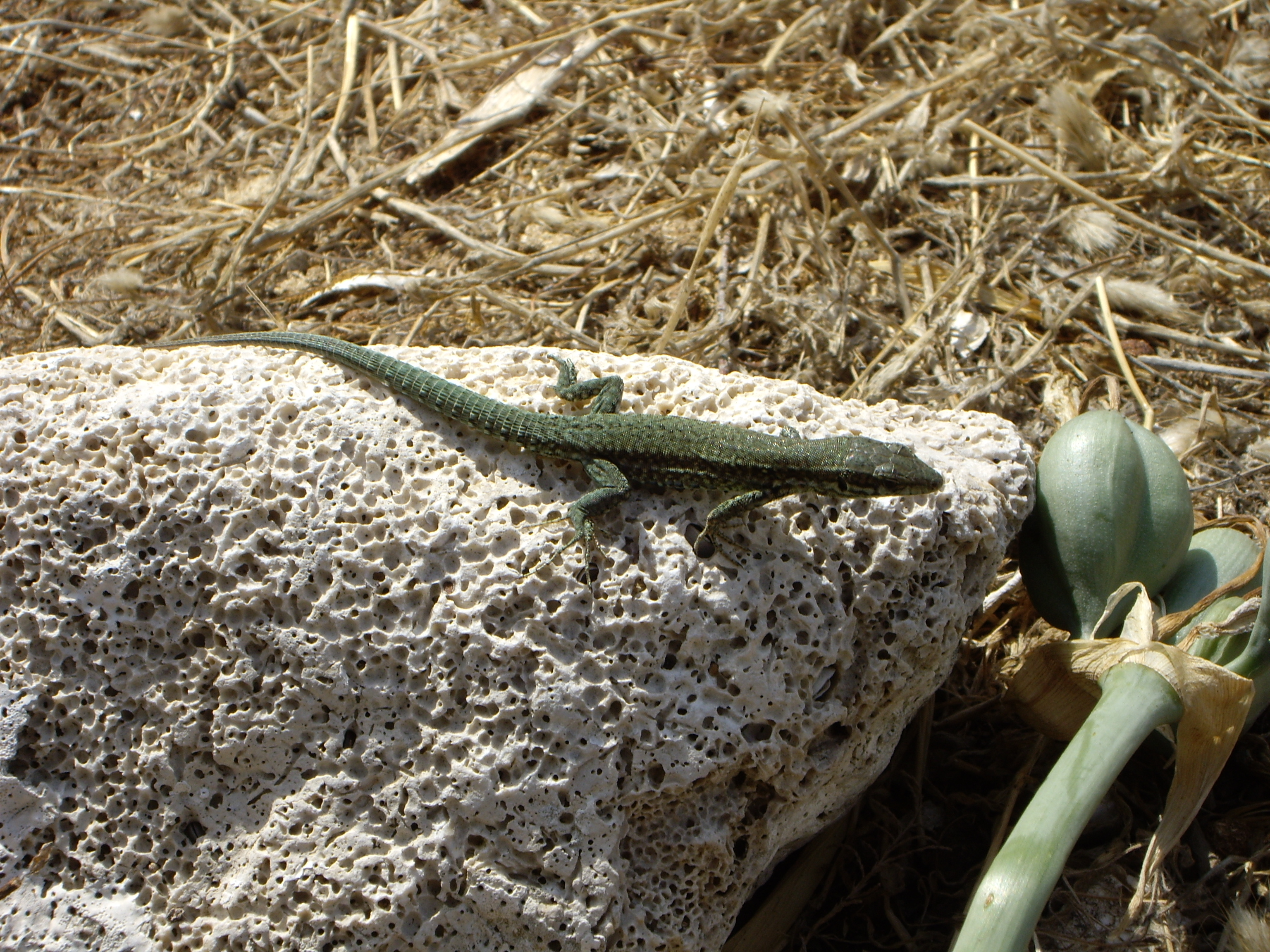 Lézard sur l'île du Riou (France)